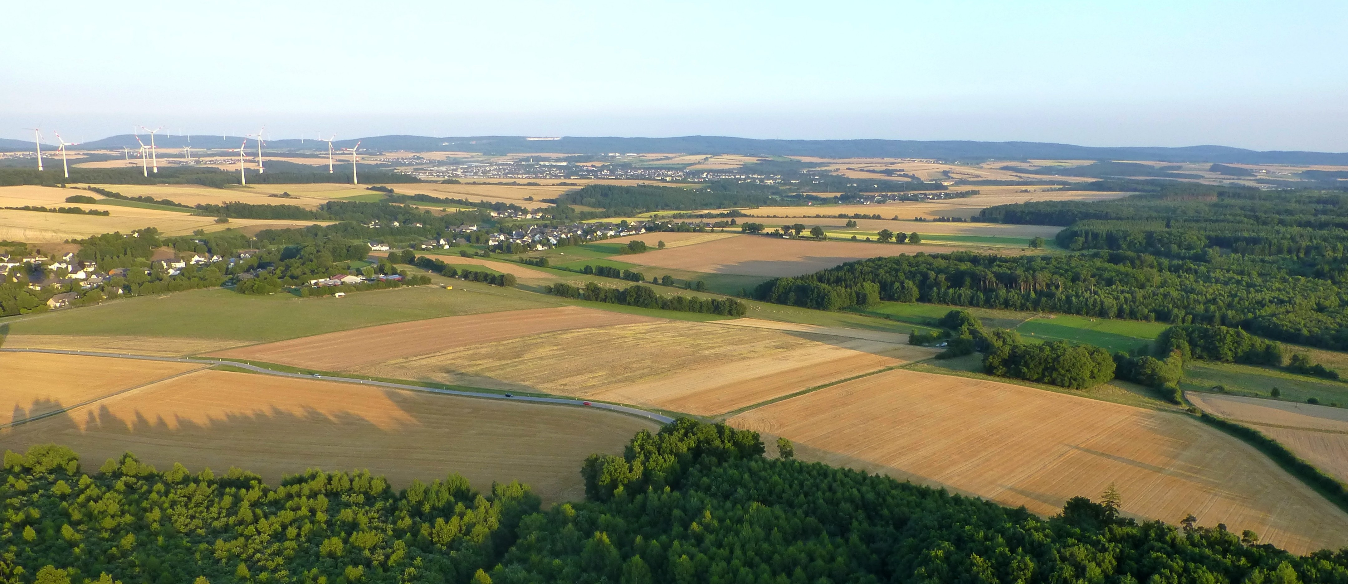 Blick über das Külztal nach Simmern